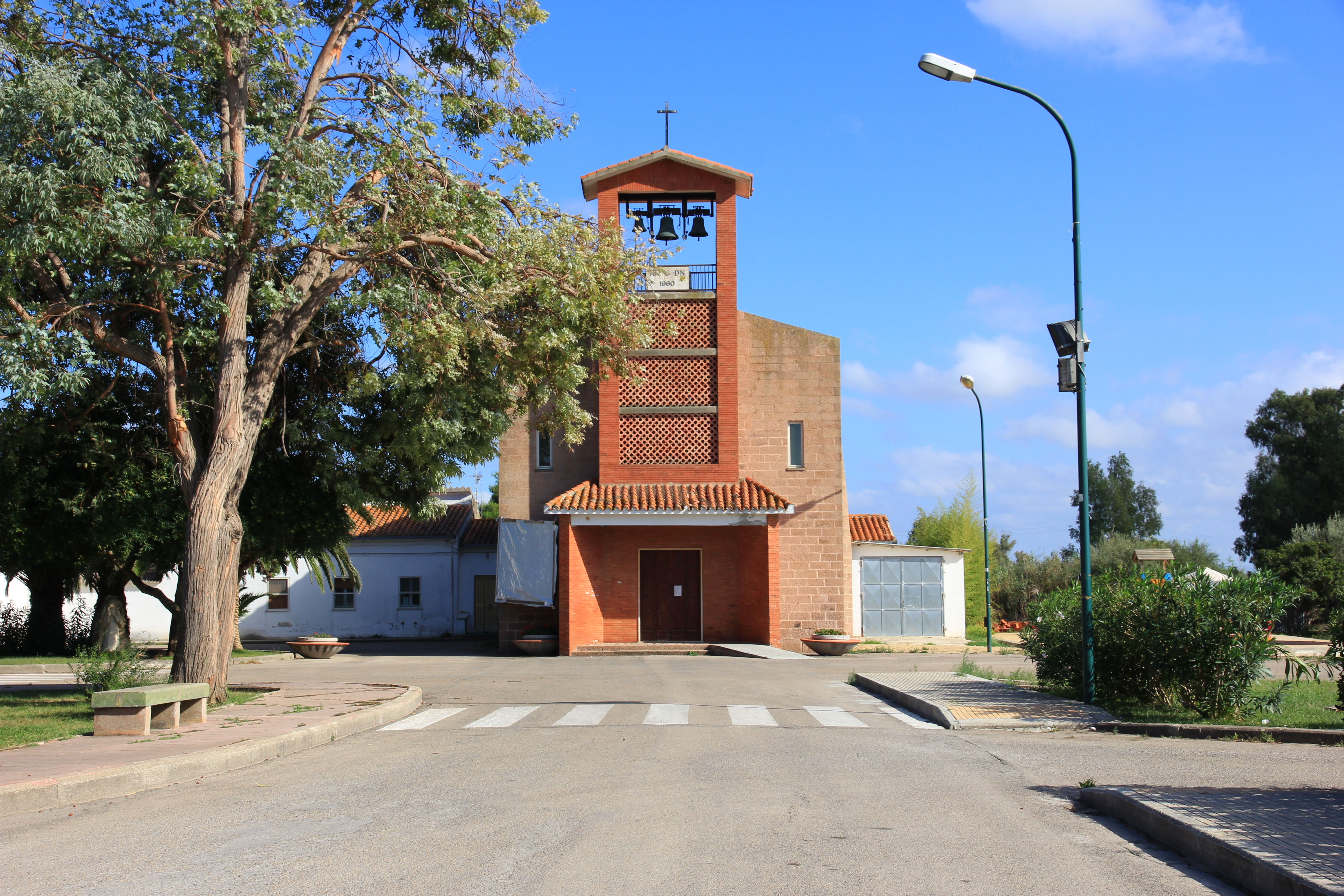 Sassari - Campanedda - Chiesa di Santa Maria